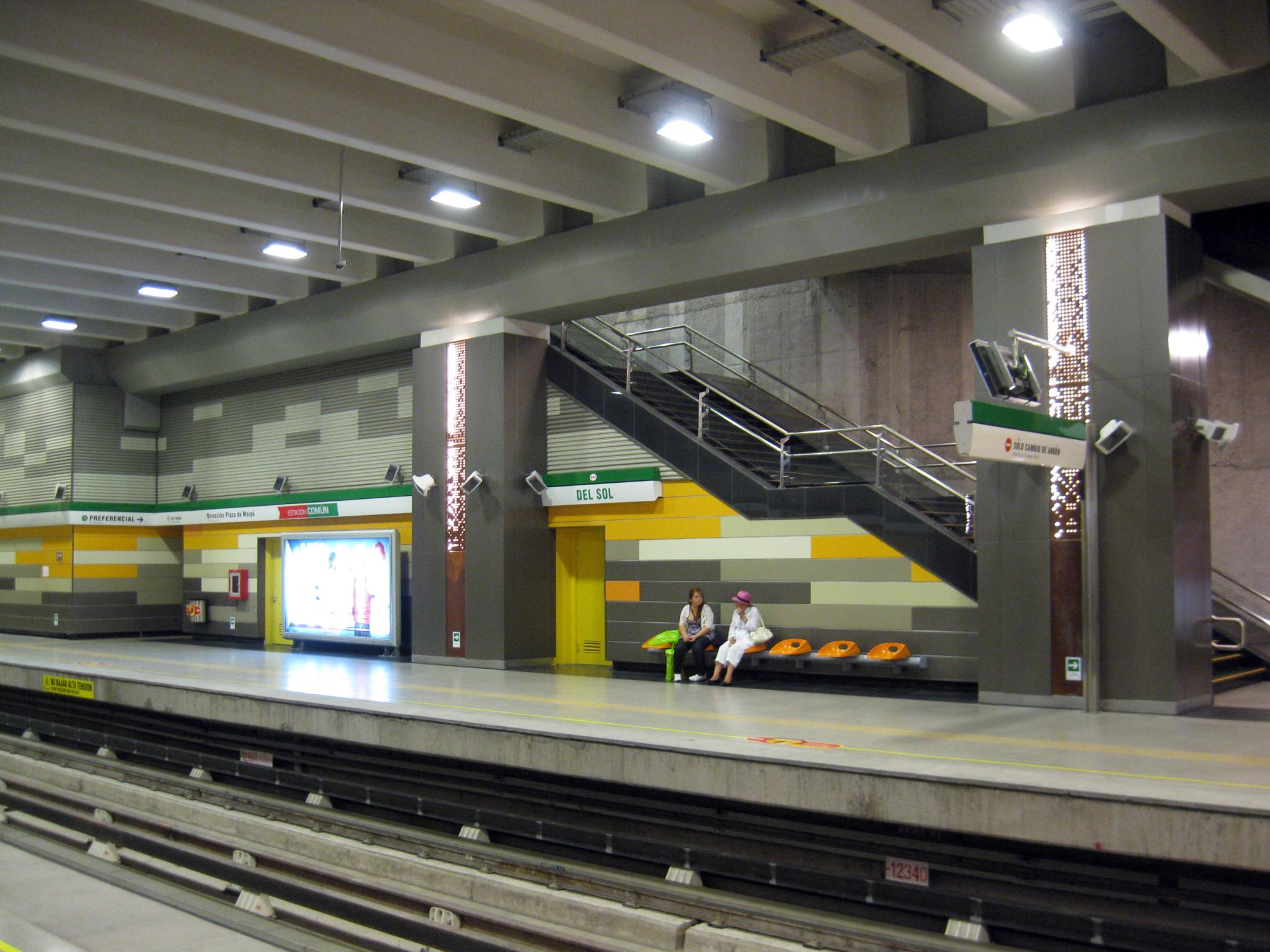 Extensión Poniente Línea 5: Febrero 2011